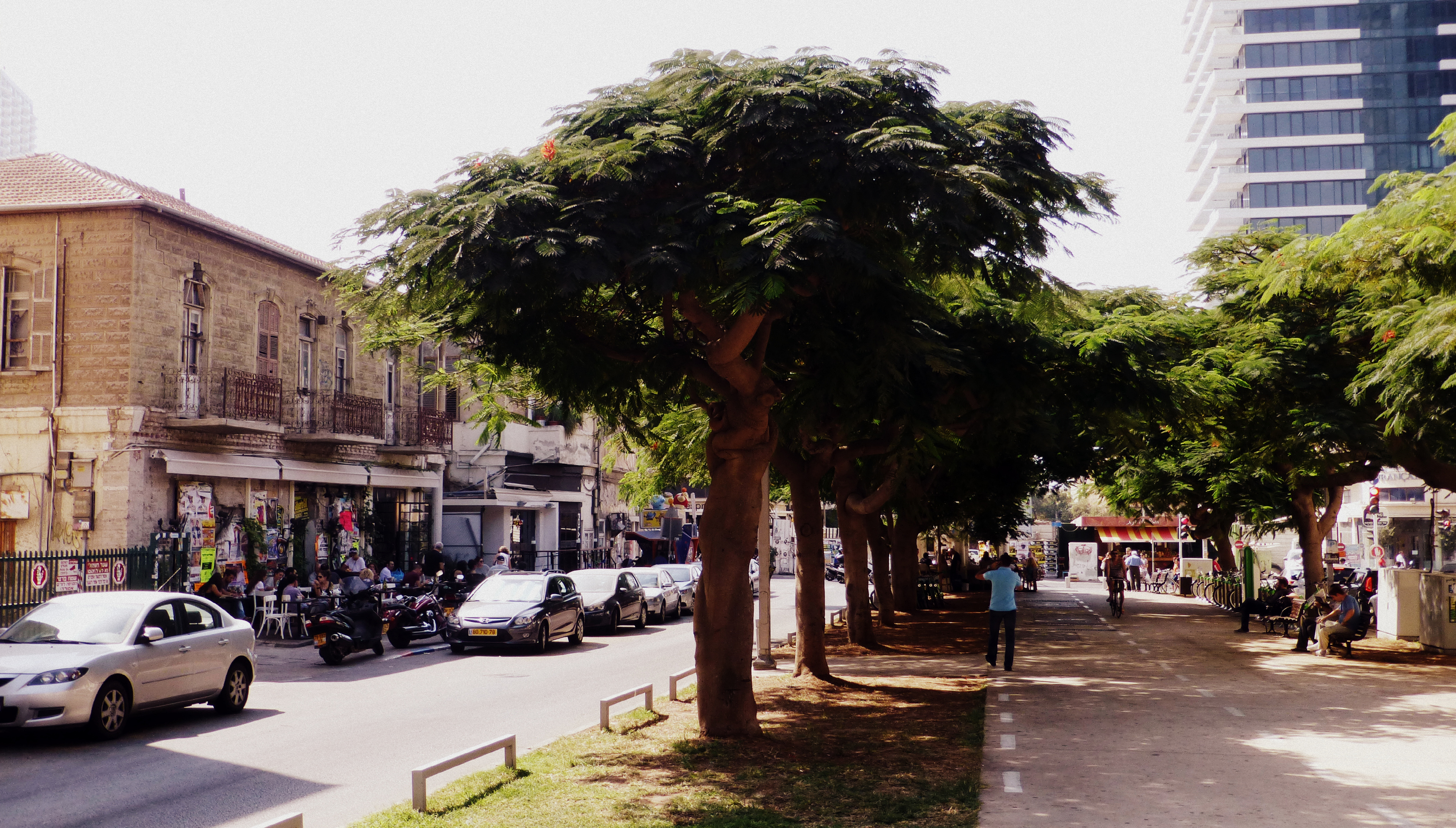 אברהם פוגל היה מראשוני 'אחוזת בית' בתל אביב הקטנה. הבית, שנבנה ב 1939, ברחוב רוטשילד, עדיין לא שופץ או שומר והוא מציג מבנה בית מקורי מן הבתים הראשונים בתל אביב. כיום יש במקום פאב. בחזית הבית מופיעה כתובת קיר המציגה גרפיטי של מחתרת האצ"ל, שנכתב בשנות ה-1940. פוגל עצמו נרצח ב 1939 והרצח לא פוענח עד היום.